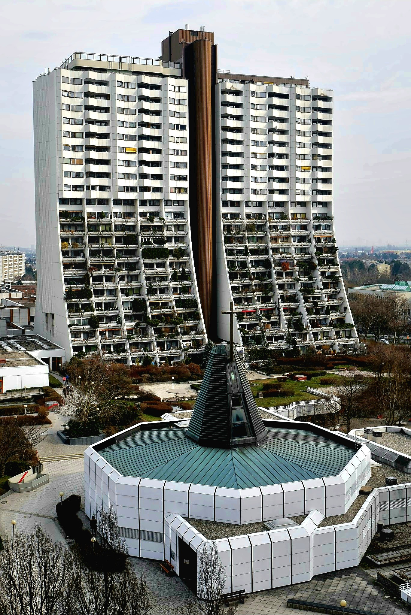 Atzgersdorf, 1230 Vienna, Austria